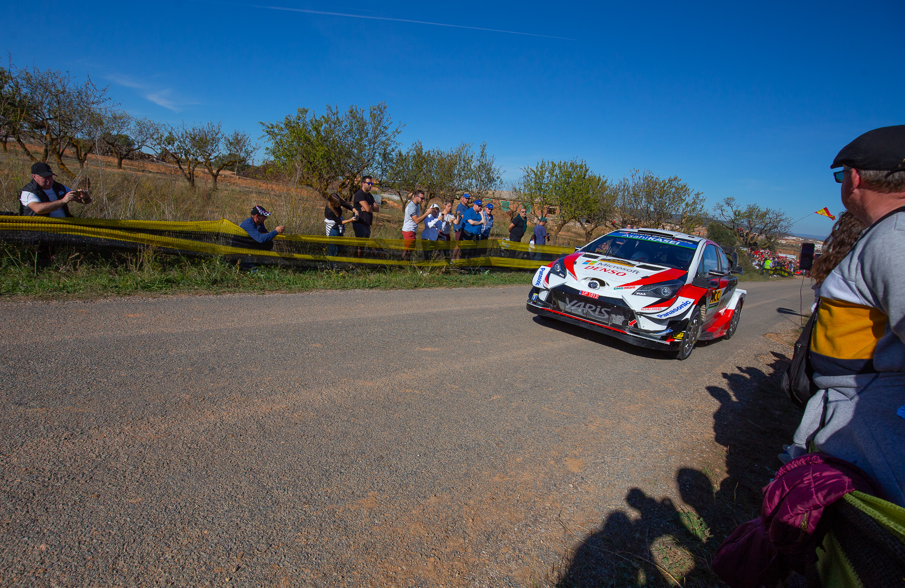 Ott Tänak - Rajd Hiszpanii 2019